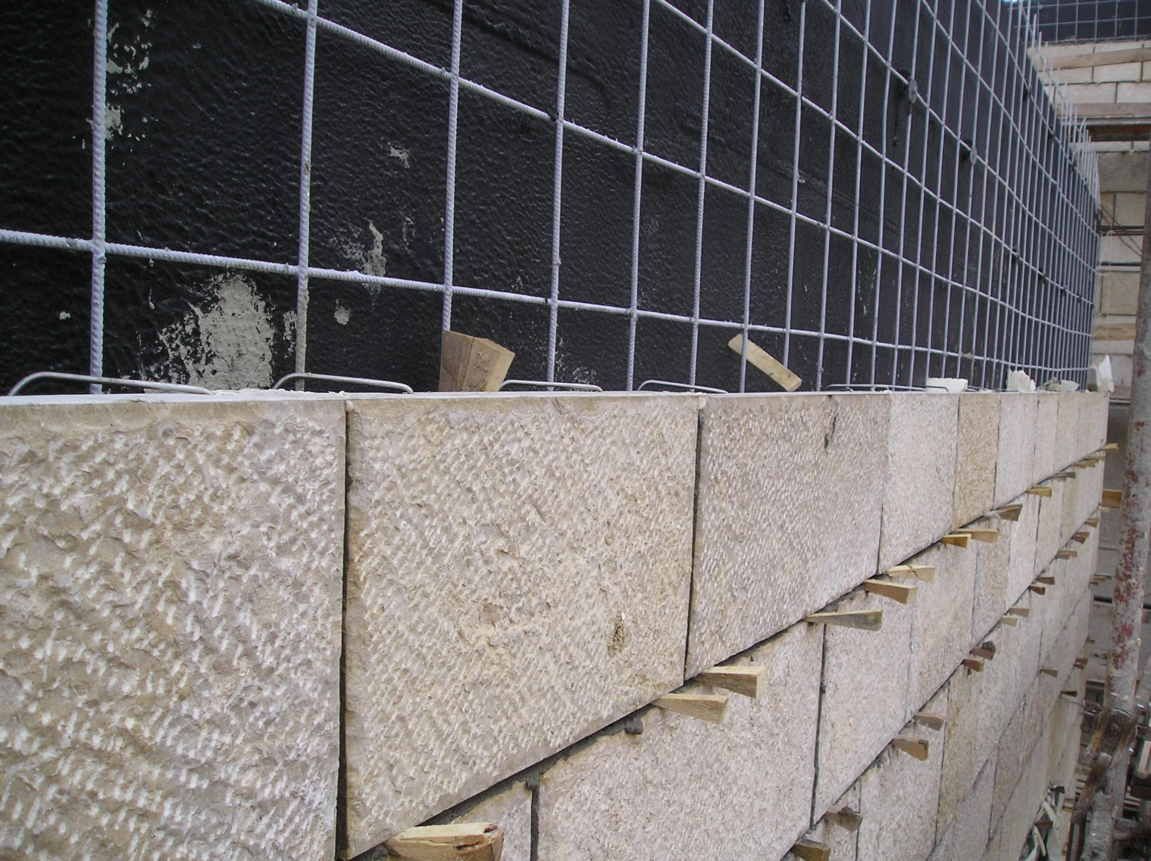 Stone building by Jerusalem Gardens in Mamilla Mall , Jerusalem